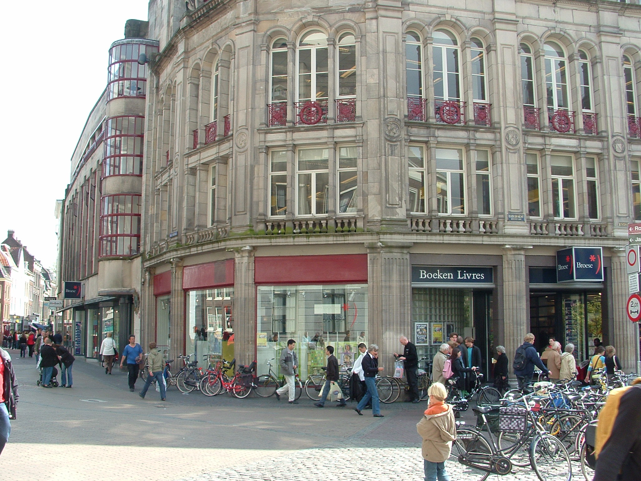 Boekhandel Broese op de Stadhuisbrug. De winkel bevindt zich op de begane grond van het afgebeelde pand. De bovenste etages huisvesten de Gemeentebibliotheek Utrecht.